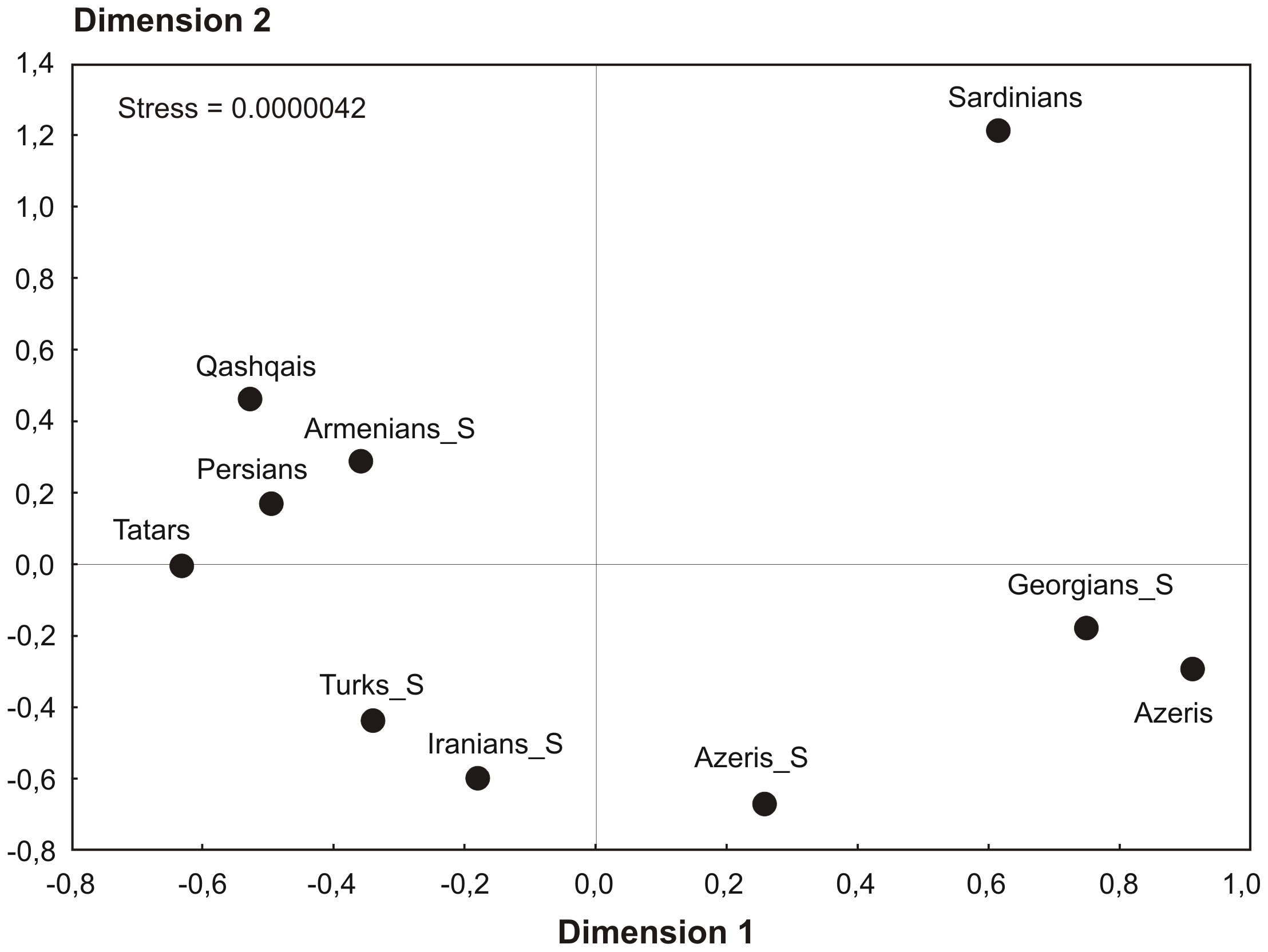 برخی از گروه های قومی mtDNA مقایسه شباهت